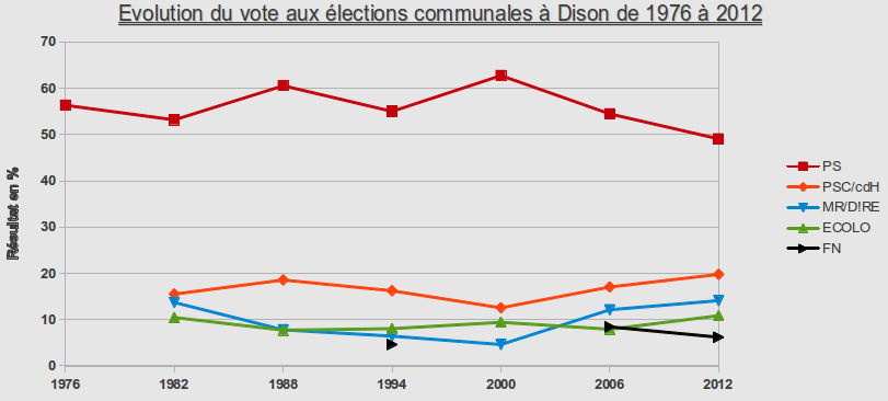 Evolution du vote aux élections communales à Dison de 1976 à 2012